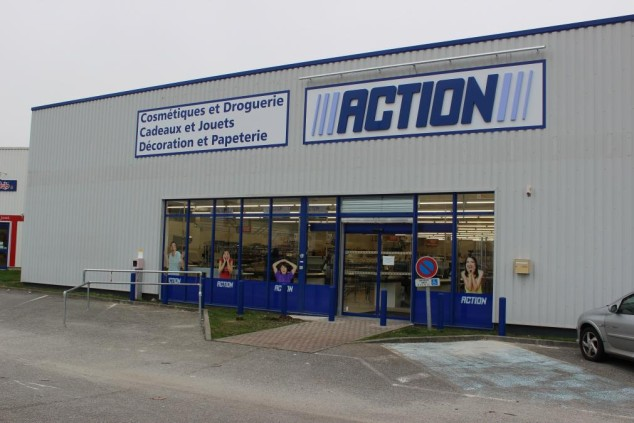 Le magasin de Bernay dans l'Eure